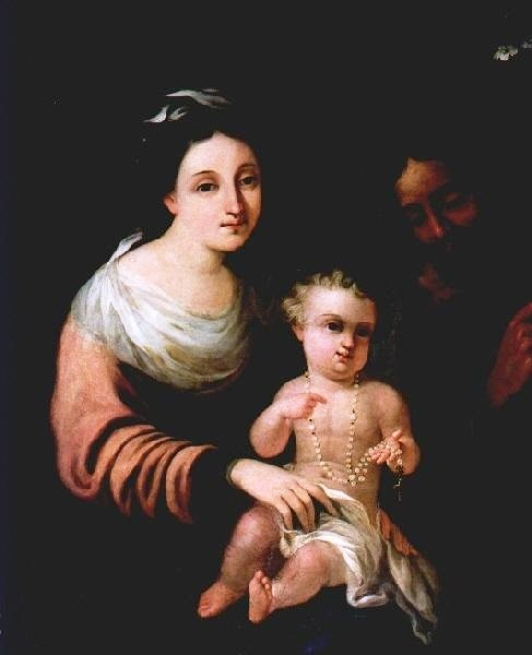 La obra representa a los tres miembros de la Sagrada Familia cristiana.